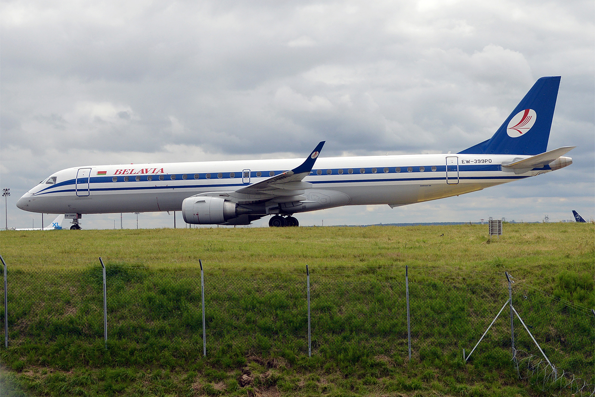 Belavia, EW-399PO, Embraer ERJ-195LR